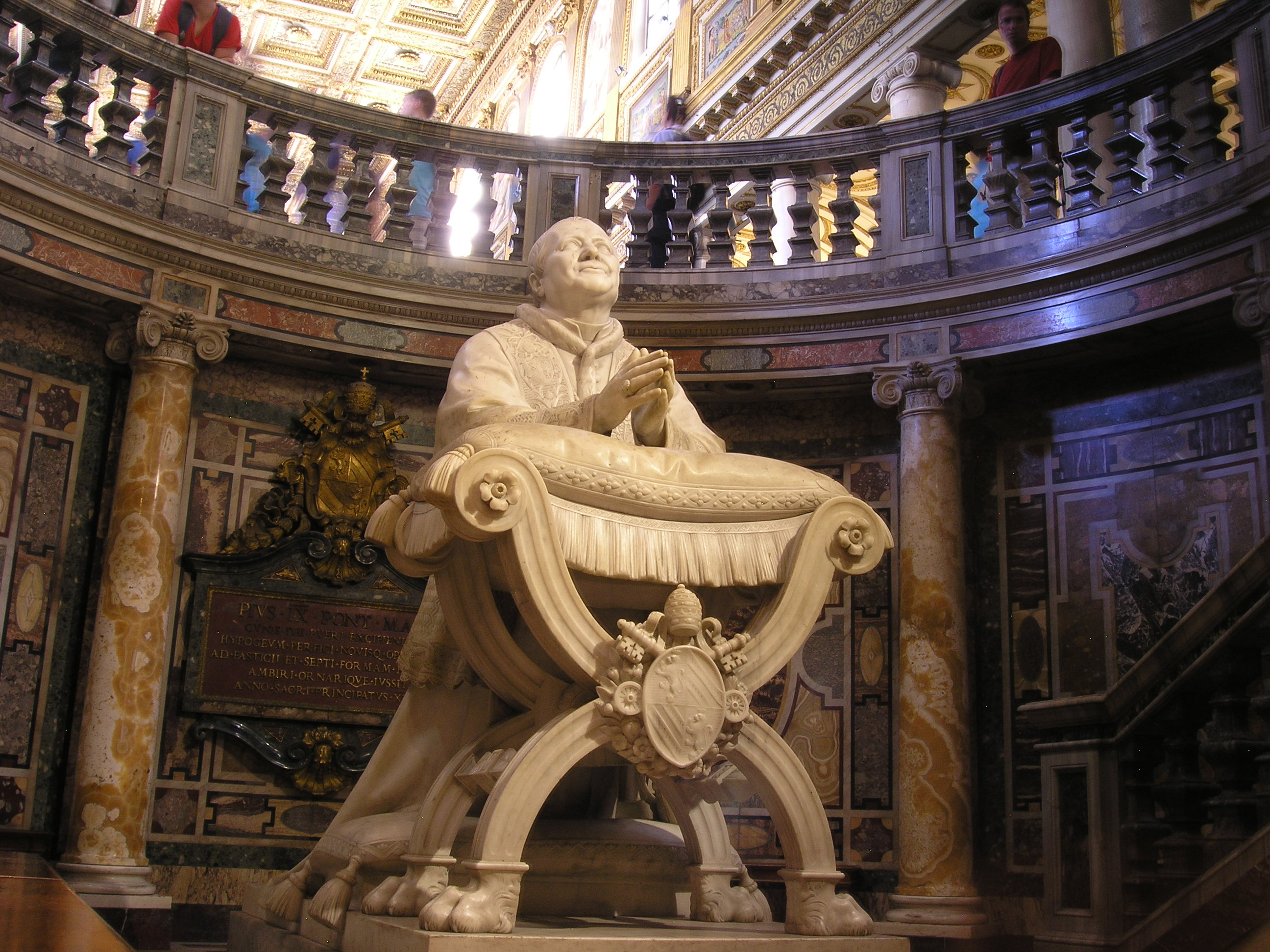 Statue des Papstes Pius dem IX. in der Basilika Santa Maria Maggiore in Rom, Italien.